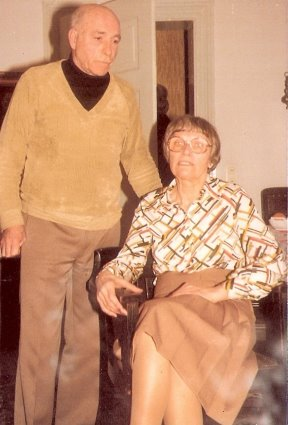 Heinz Helfgen mit Ehefrau Kunigunde in den 80ern